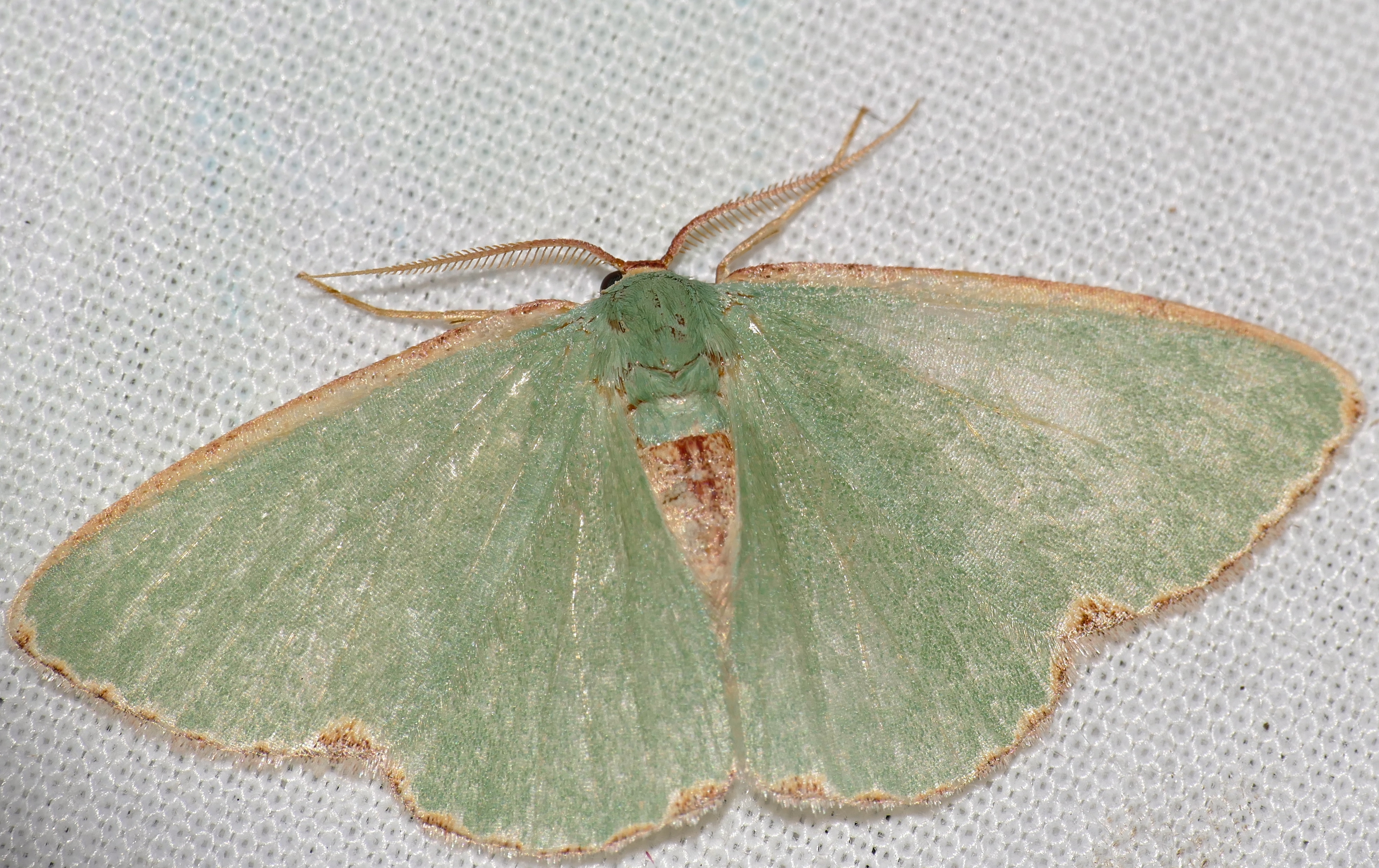 Mpila Camp, iMfolozi Game Reserve, Hluhluwe-iMfolozi Park, Kwazulu-Natal, SOUTH AFRICA